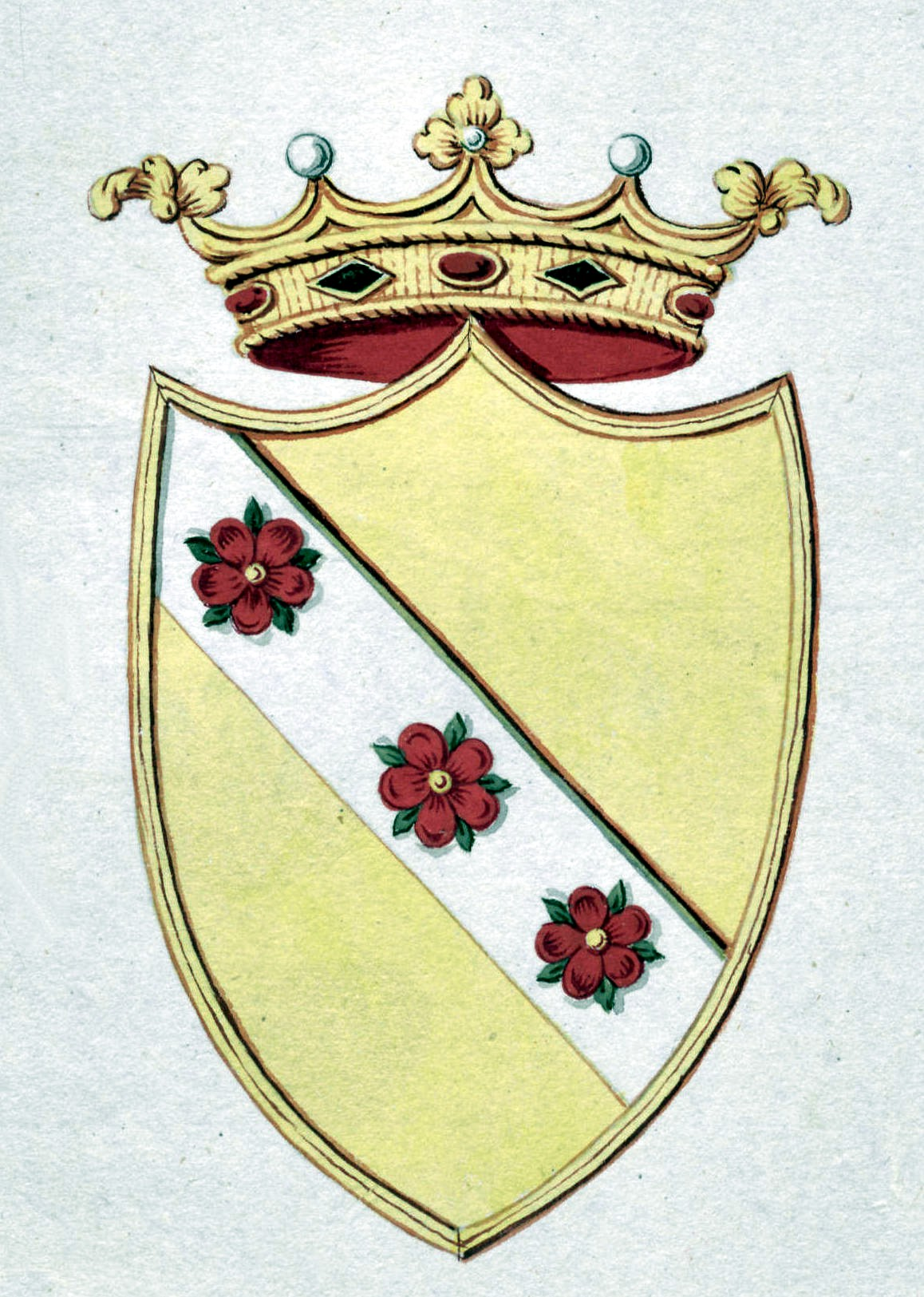 Wappen derer von Rode (Nobilitierung 1803). Rode (1803) - Adelslexikon, Band XI, Seite 463 Ev. - Aus Dessau stammendes Geschlecht, dessen Stammreihe mit Johann August Rode, * 1695, † 1773, Fstl. anhalt-dessau. Hof- und Amtsrat. beginnt. - Preuß. Adelsstand Berlin 16.10.1803 (für seinen Sohn August Rode, Fstl. anhalt-dessau. KabRat). W. (1803): In G. ein mit 3 r. Rosen bel. s. Schrägbalken; Adelskr. L: DGB 40 (1923), S. 266 - Ahnenreihen aus allen deutschen Gauen 2 (1931-1936), s. 216-220. Quelle: Geheimes Staatsarchiv Preußischer Kulturbesitz, Archivstraße 12 - 14, D - 14195 Berlin. Signatur: XX. HA, Wappensammlung Galandi, Nr. 723.